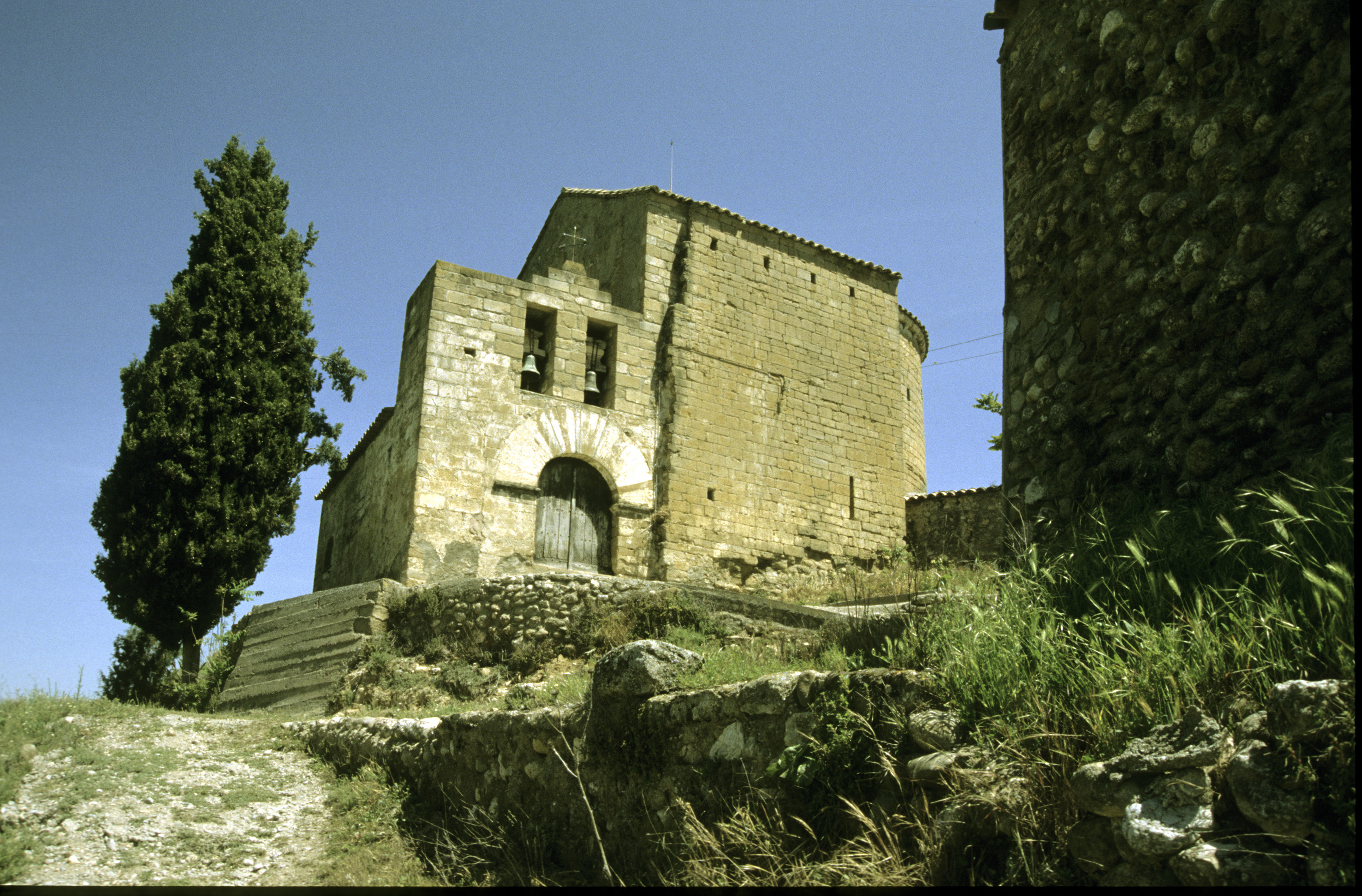 Sant Miquel de Siscar (abans Sta. Maria). És l'actual parroquial del poble de Siscar, i antigament fou seu de la comanda hospitalera. Segle XII.